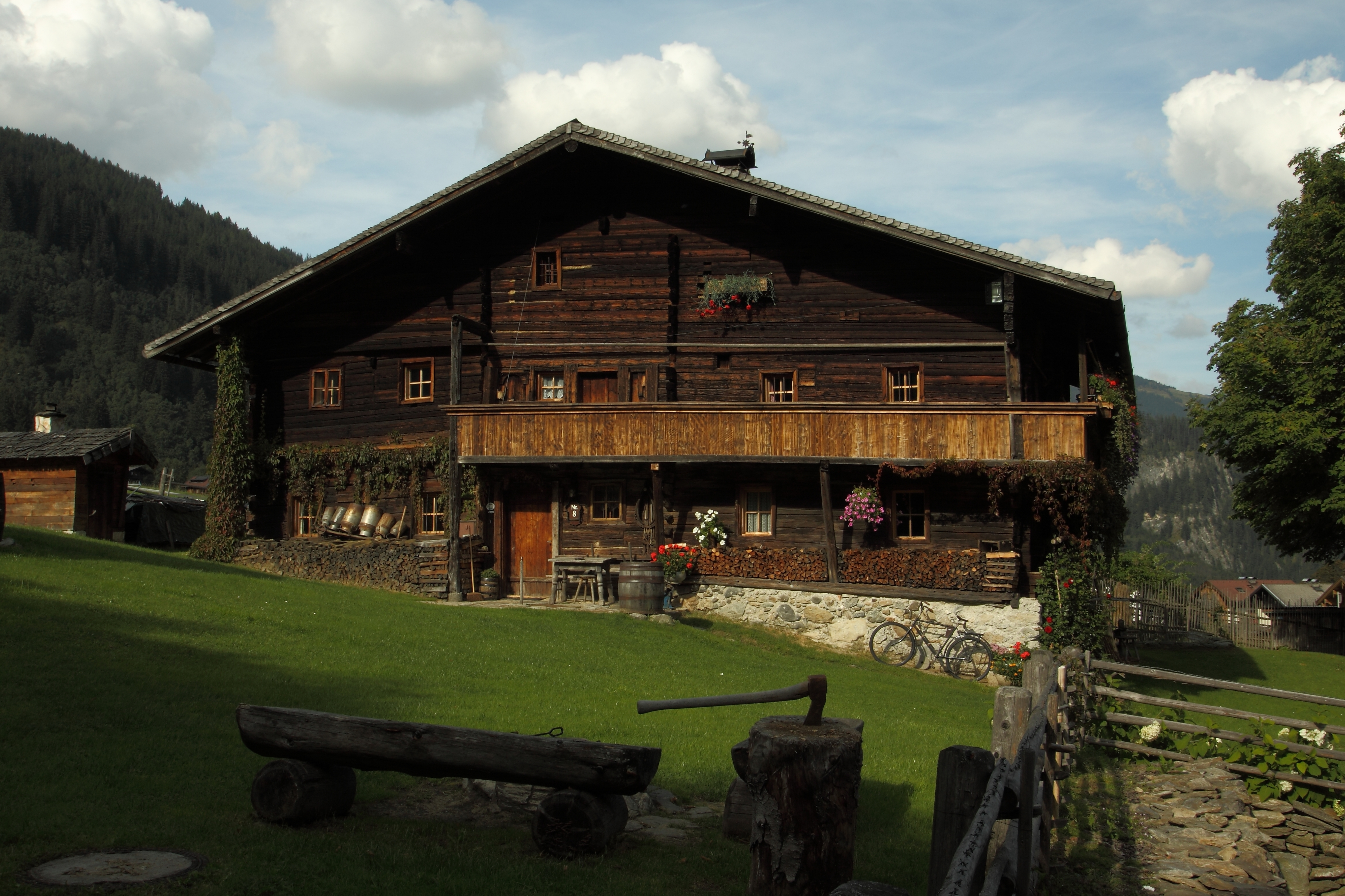 Bauernhaus, Hinterlehenbauer (Wallner Geburtshaus)